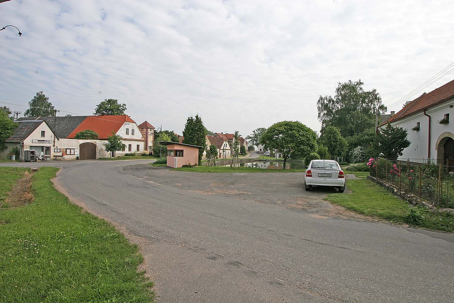 Náves v obci Újezdec v okrese Svitavy